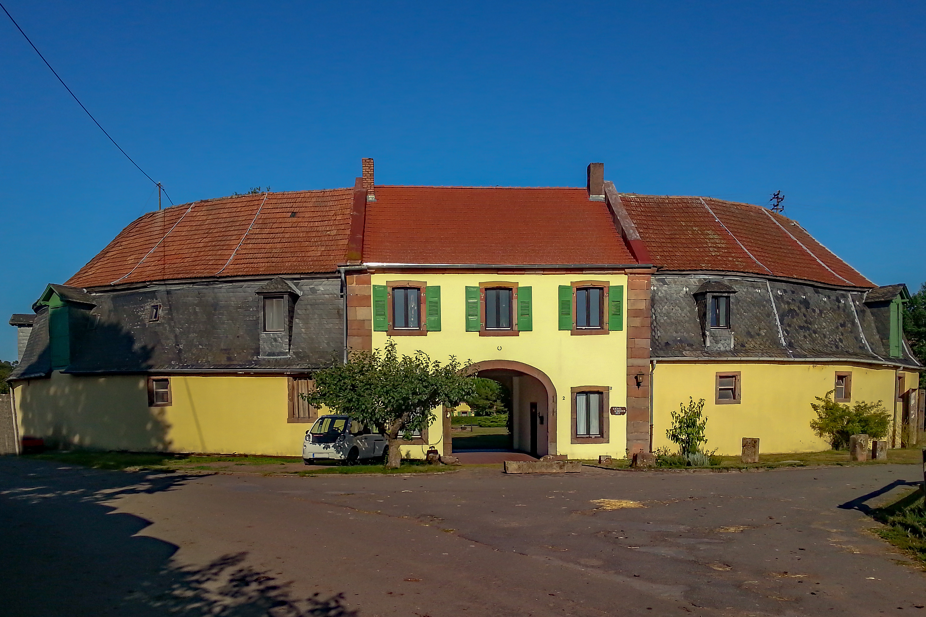 Eichelscheiderhof, Ansicht von Westen